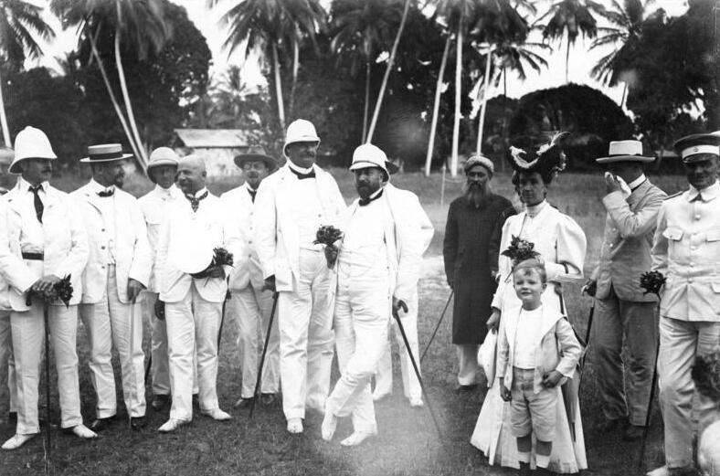 Exzellenz Dernburg in Ostafrika Zanzibar. Besuch im indischen Club